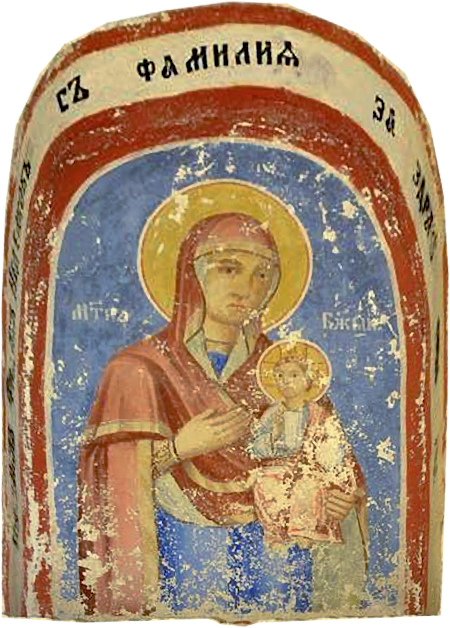 Надвходен стенопис от църквата „Света Богородица“ в демирхисарското село Слоещица, Република Македония